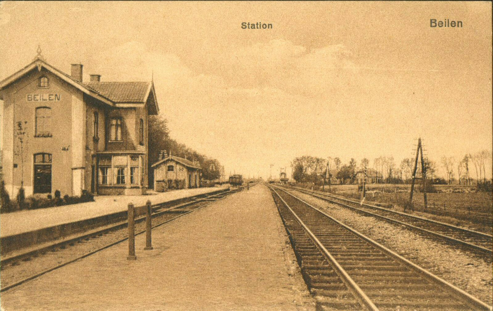 Gezicht op het N.S.-station Beilen te Beilen.